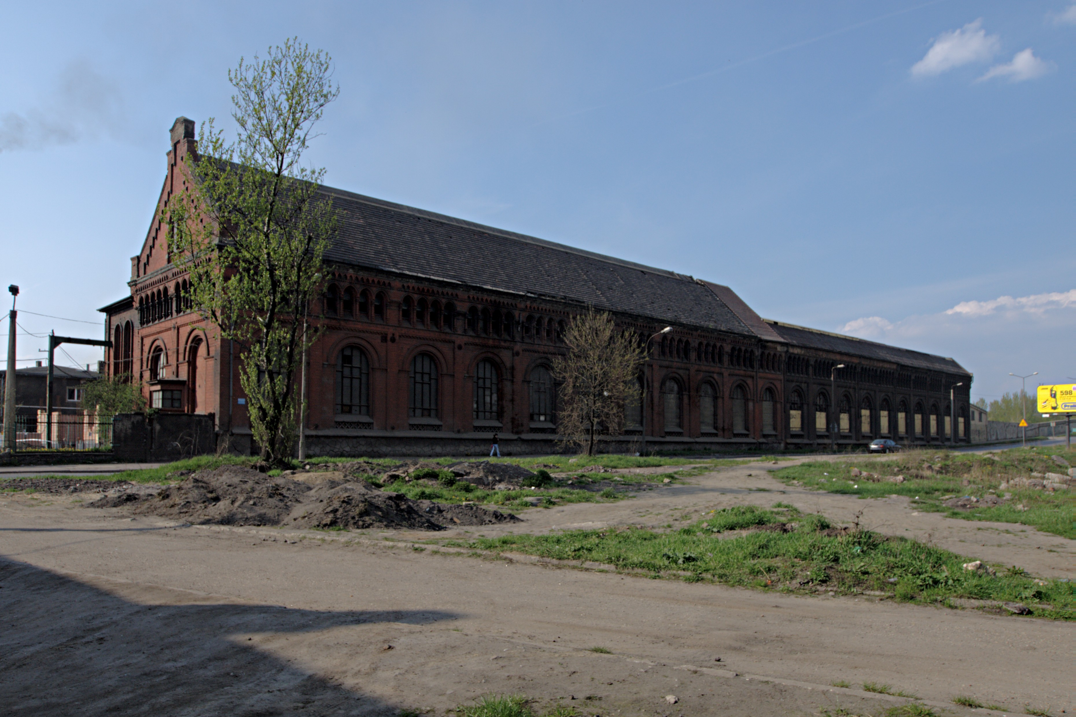 Siłownia Huty Bobrek, północna część hali z 1907 roku, południowa (dalsza na zdjęciu) z 1900 roku.